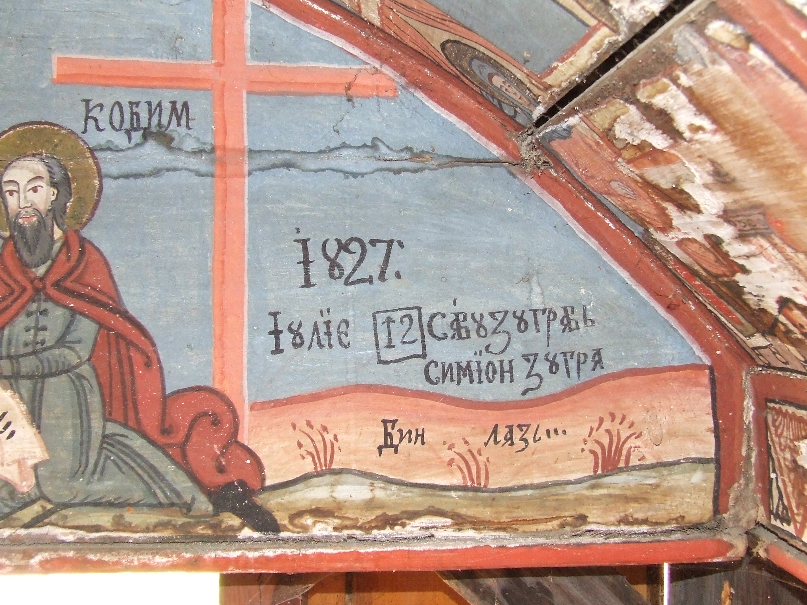 Capela-osuar din Jina, judeţul Sibiu.